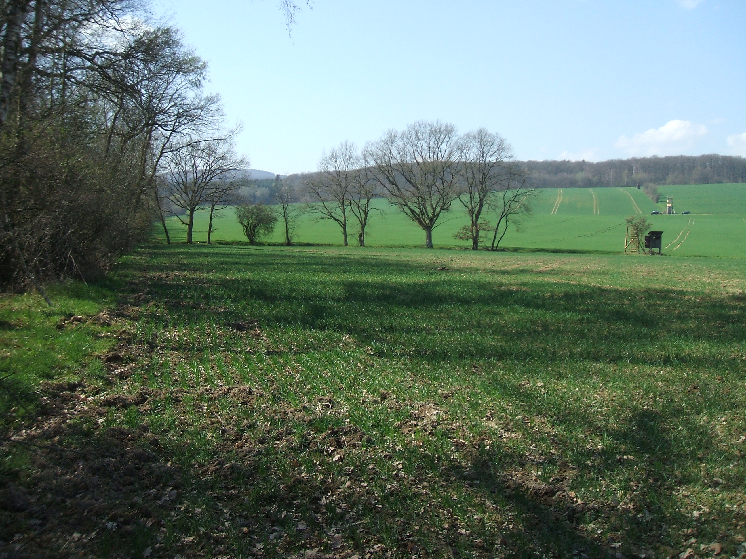 Ansicht des Deutergrabens, wie er vom Waldrand zum unbefestigten Feldweg abbiegt, und des trockenen Grabens mit dem Schäferborn